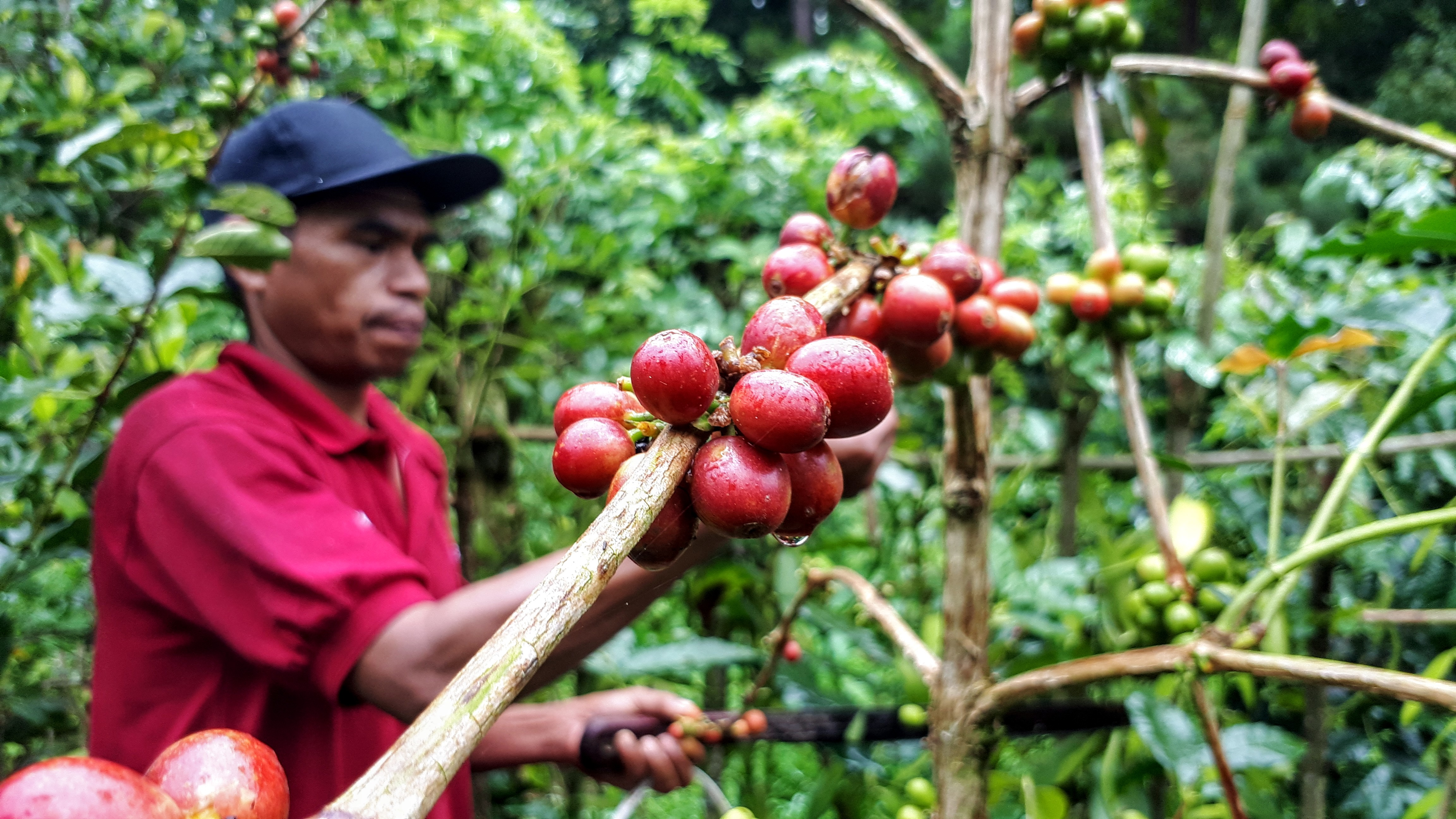 petani kopi arabika